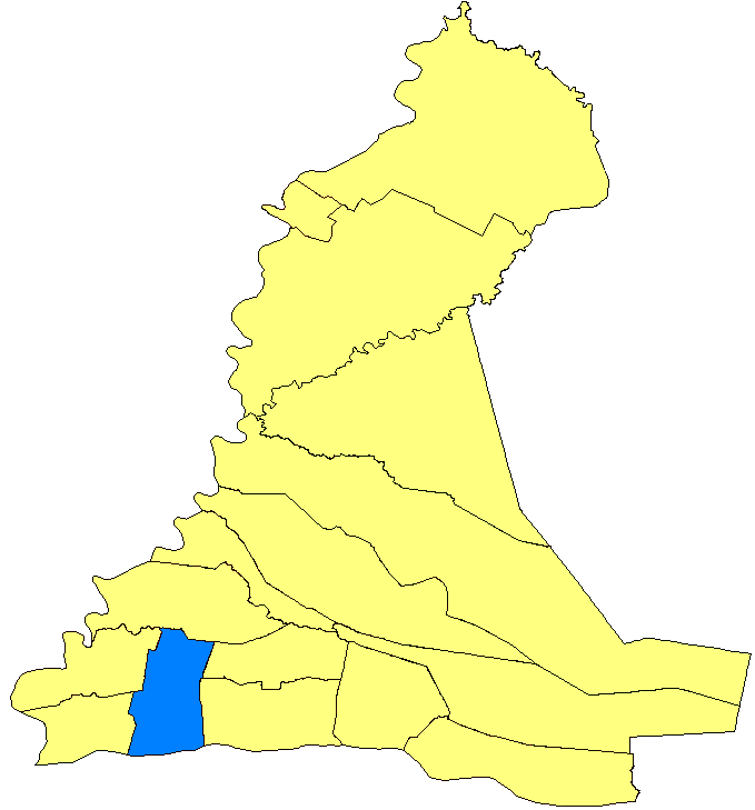 Mapa de Gral Díaz, Paraguay.